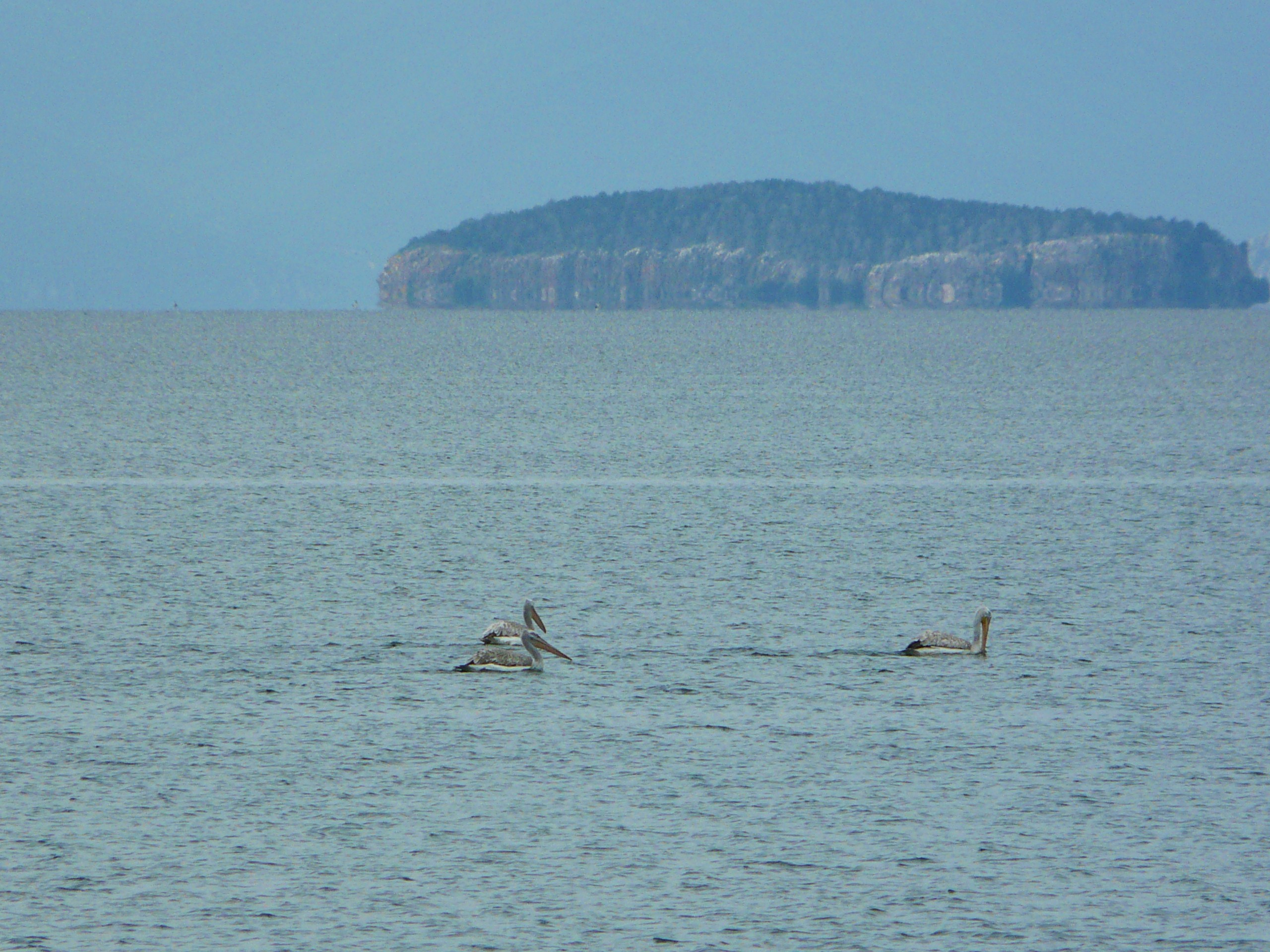 Prespa Lake, Macedonia